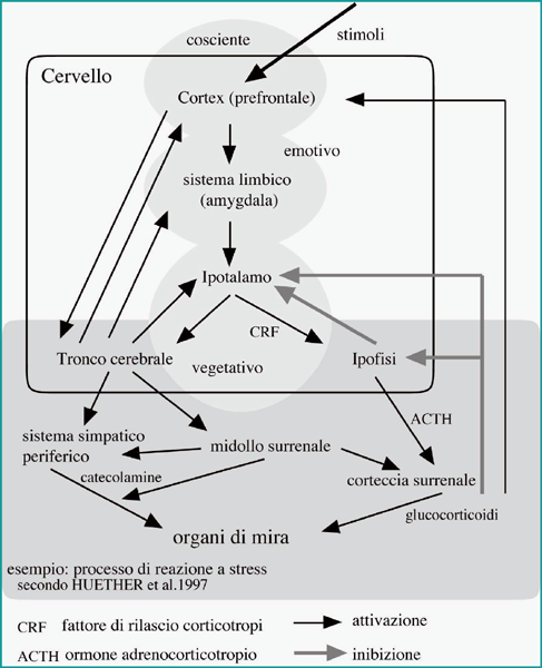 Reazioni neuro - endocrine allo stress Author: Peter Forster Author's Position: Naturopata, Docente Caption: Enciclopedia di medicina popolare; Materia medica; Sistema immunitario; Patologia dello stress Caption Writer: P. Forster Job Name: MmP 15.4 Owner URL